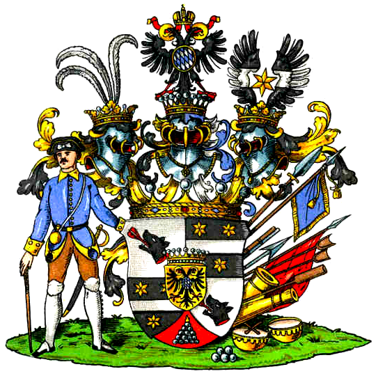 Wappen der Grafen von Schmettau (Schmettow).